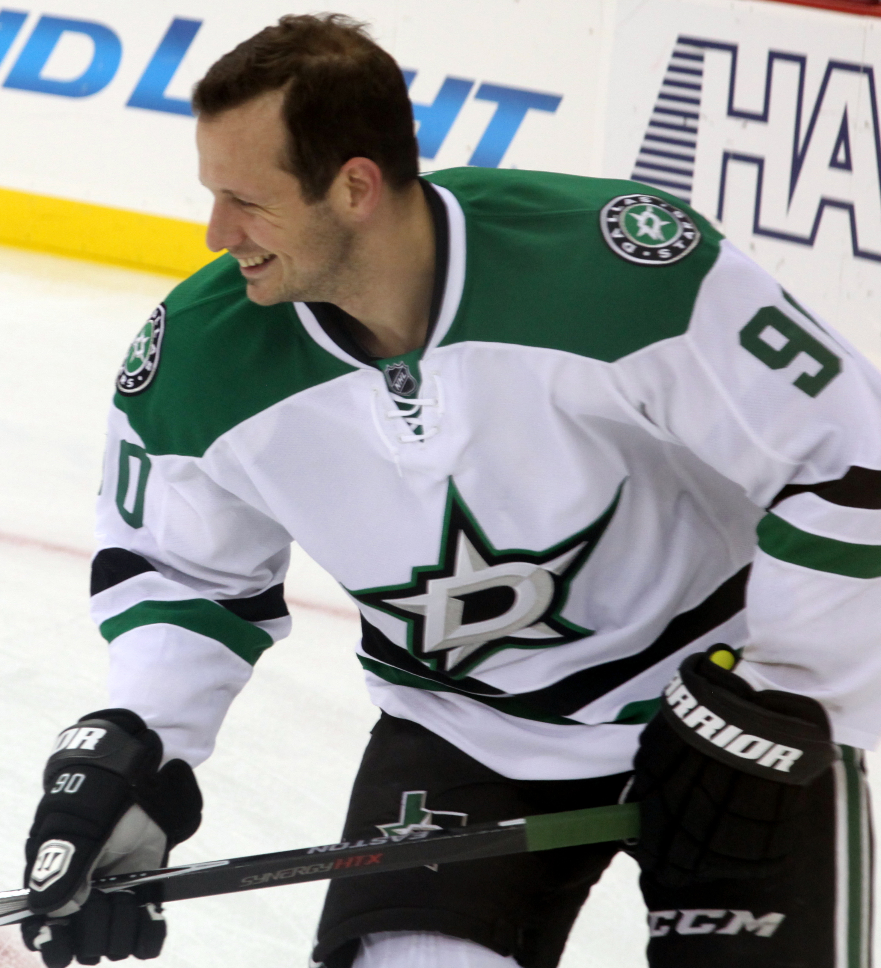 Spezza in October 2014.